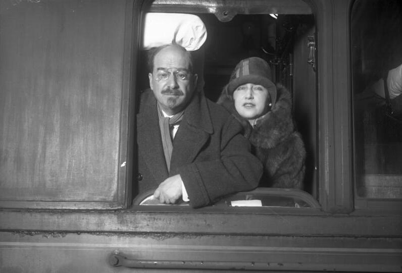 Der bekannte russische Volks-Kommissar Lunatscharski auf der Durchreise in Berlin! Der bekannte russische Volks-Kommissar Lunatscharski mit seiner jungen Gattin auf der Durchreise in Berlin.